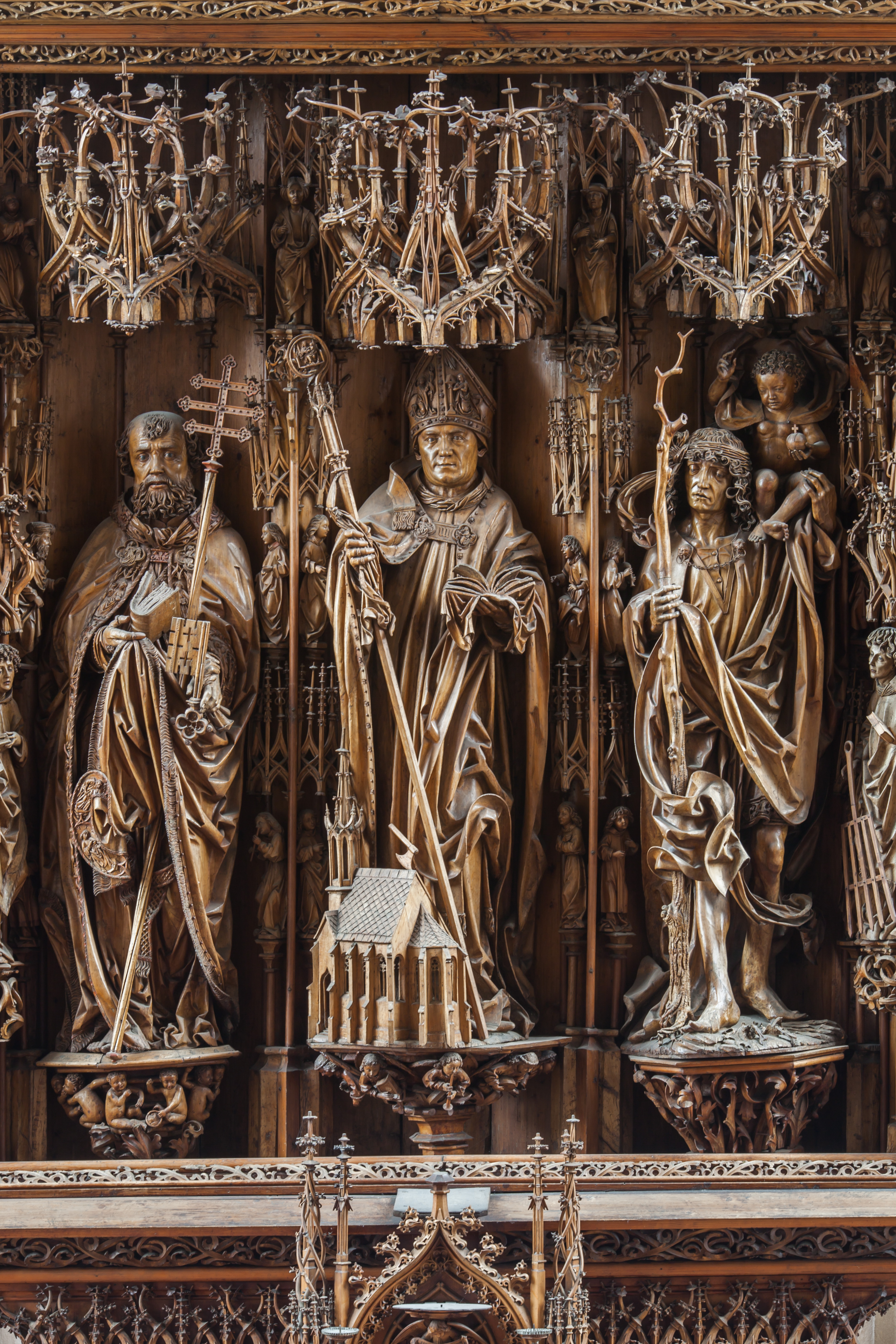 Petrus, Hl. Wolfgang, Christopherus vlnr.